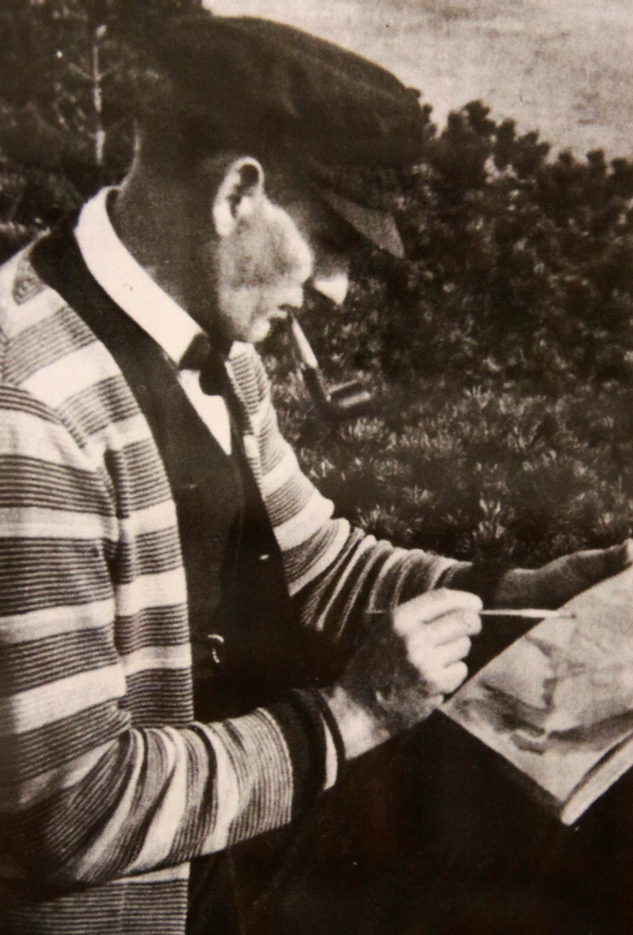 Eduard Bischoff - Fotografie einer Ausstellungstafel im Lötzener Museum in Neumünster